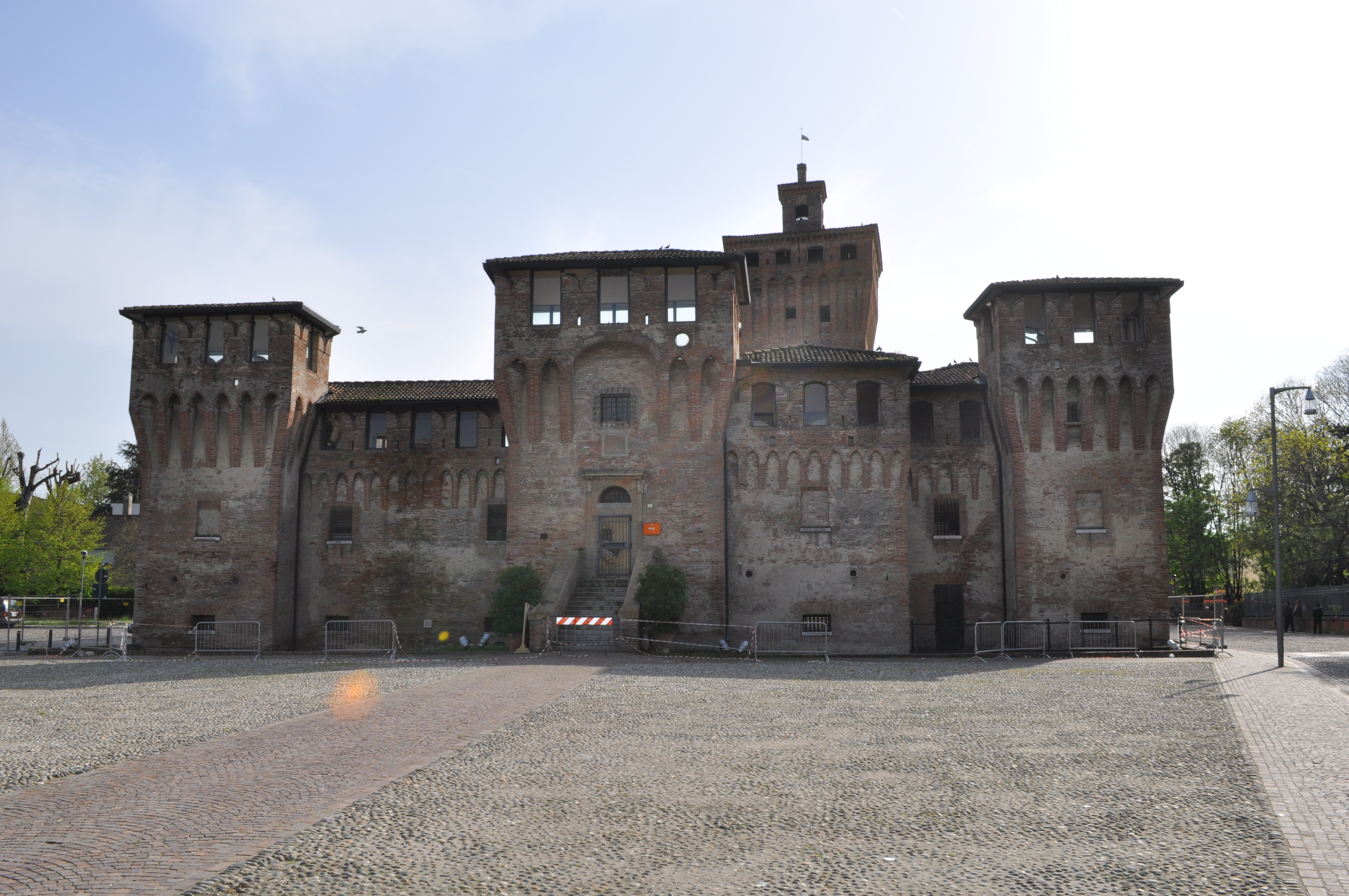 Rocca - MiBAC This is a photo of a monument which is part of cultural heritage of Italy.